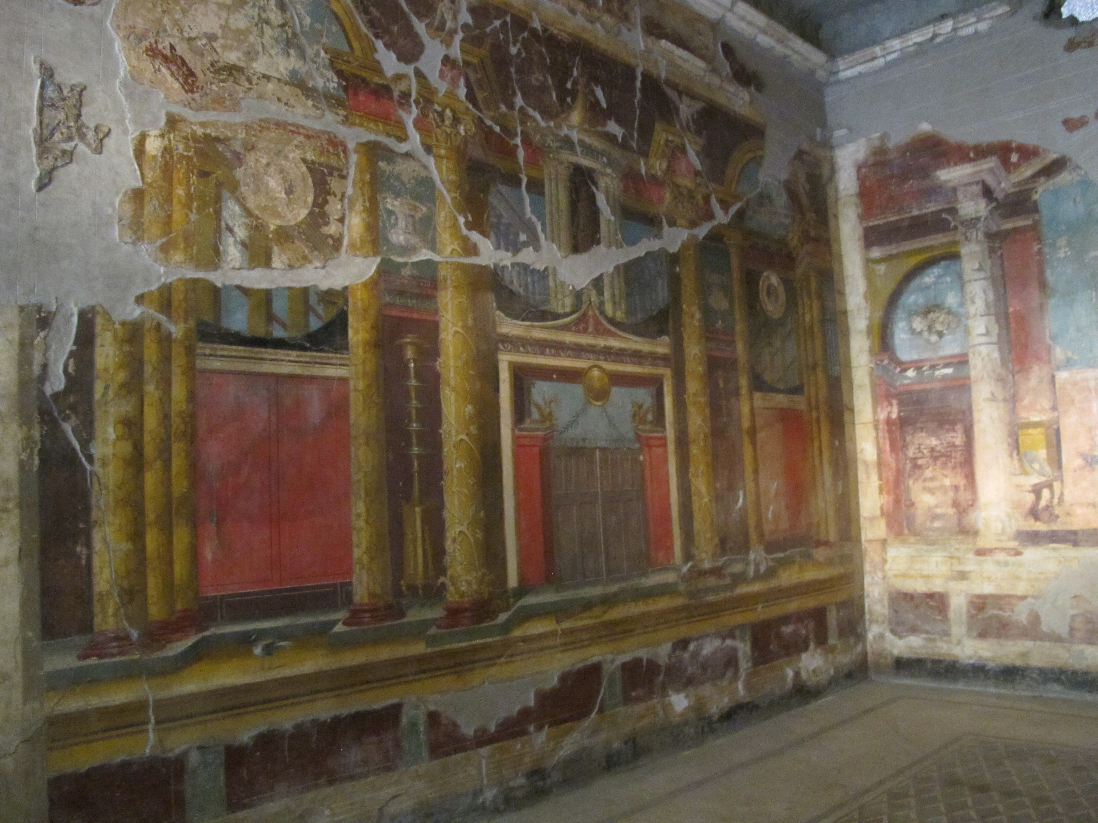 Villa Oplontis